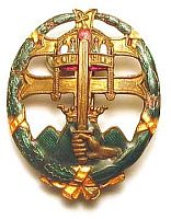 Csapattiszti Jelvény, Ovális koszorúban a magyar királyi korona, alul Szent István kardját markoló kézfej.